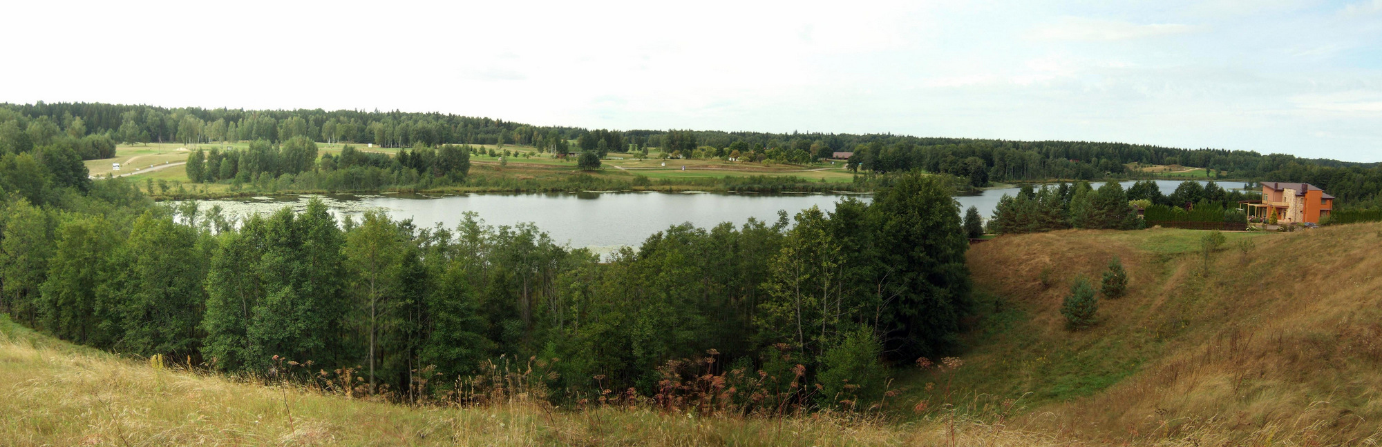 Girijos ežeras nuo Bernotų piliakalnio.